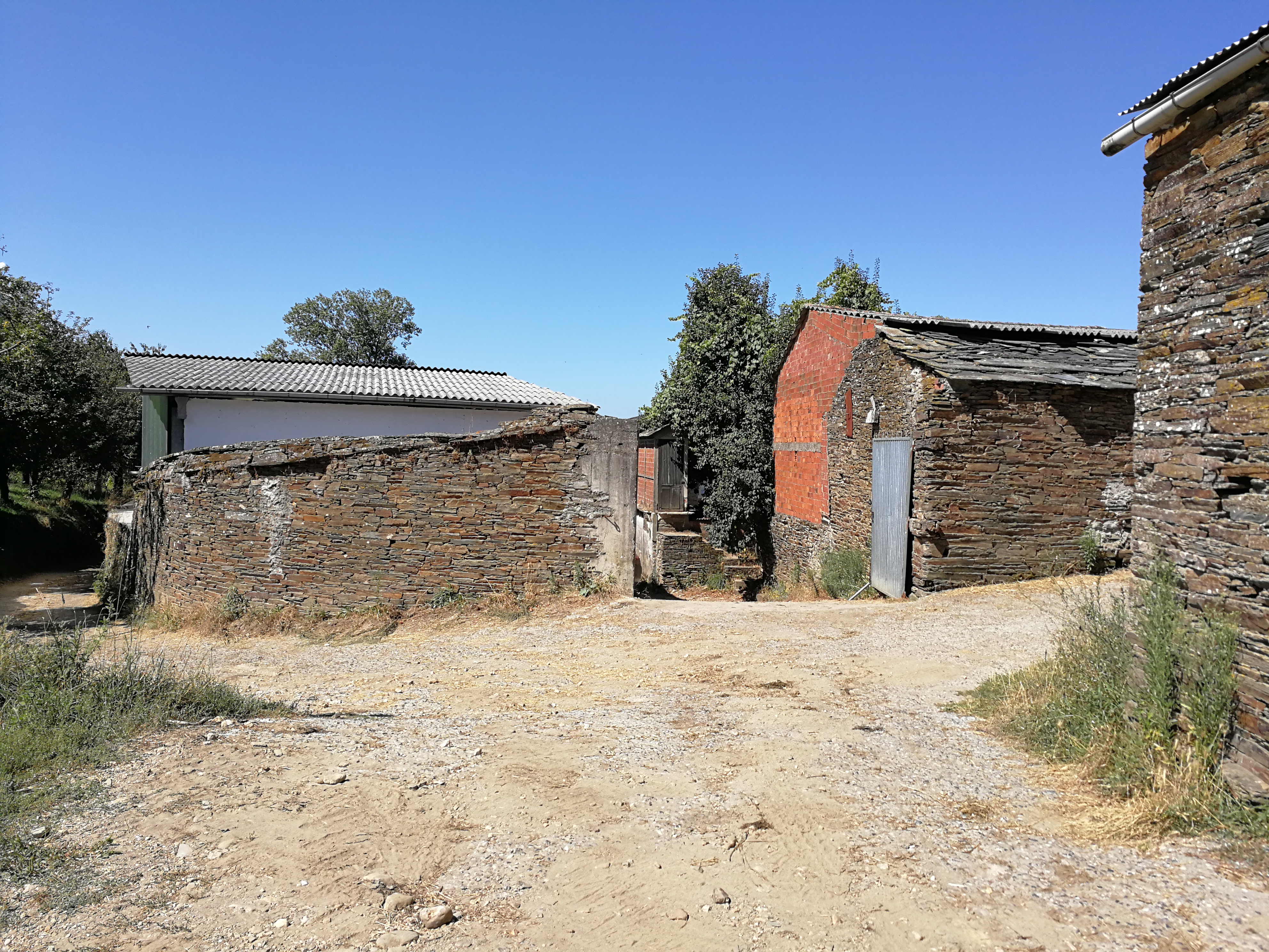 Aldea de Mundín, parroquia de Santa María de Lier, concello de Sarria, Lugo